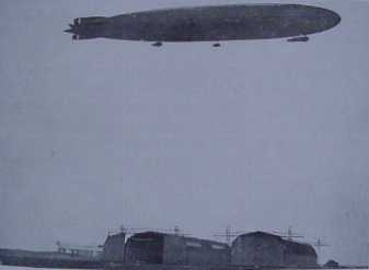 L 45 over Toni og Tobias hallerne i Tønder